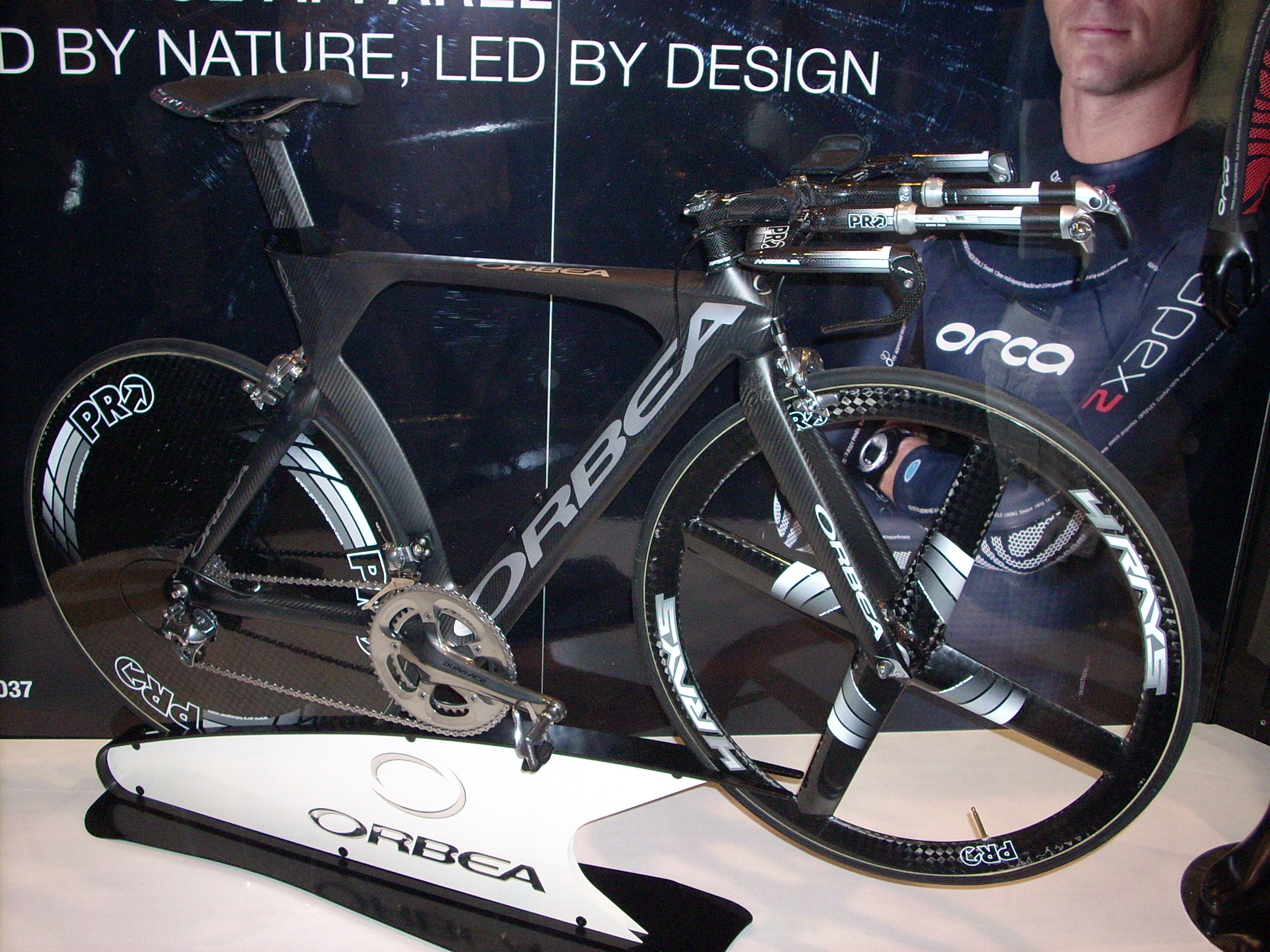 Orbea carbon TT bike